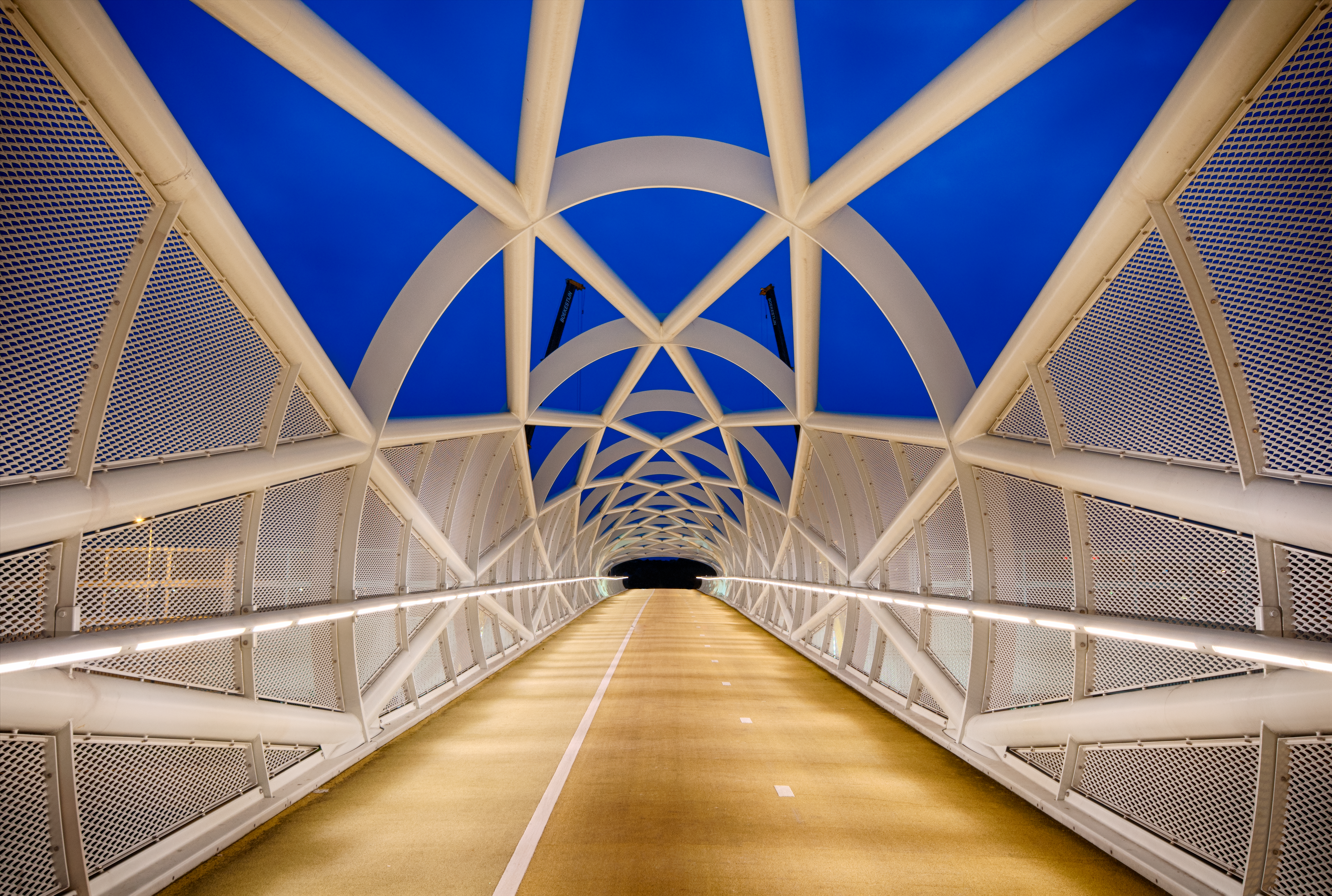 Le pont cyclable qui relie Rotterdam-Sud à Rhoon. En néerlandais, il est nommé De Groene Verbinding (« la connexion verte »).